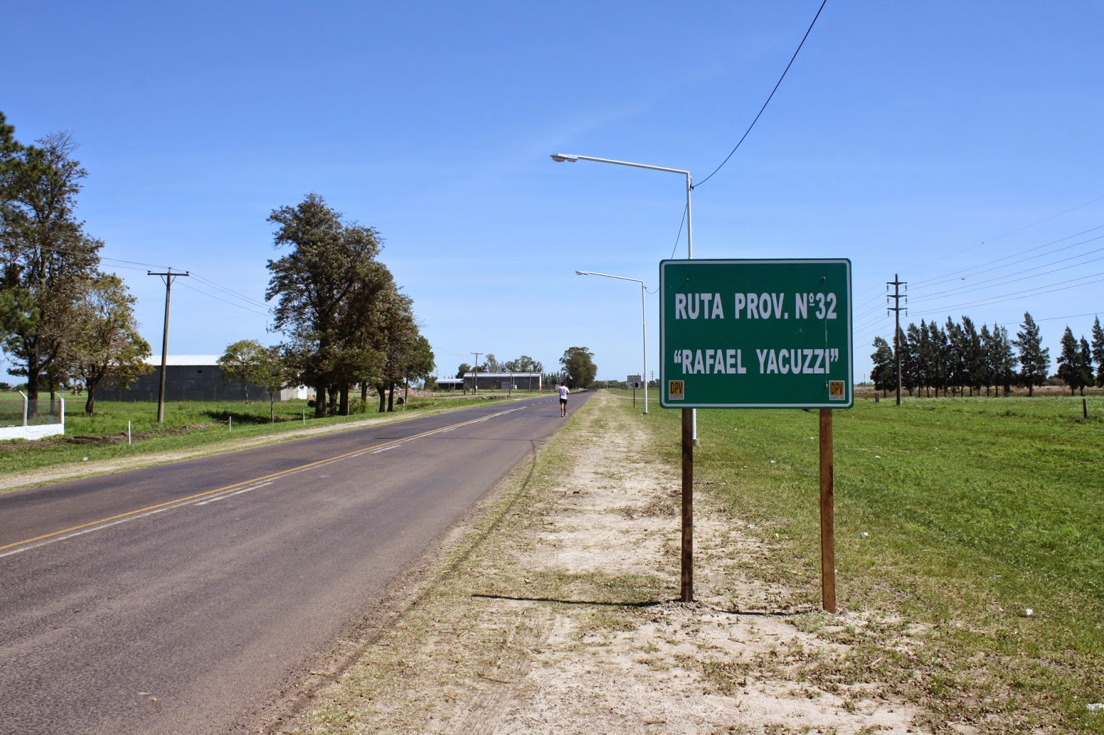 Cartel de la Ruta 32, con homenaje al padre Yacuzzi.